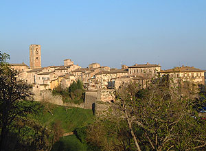 Colle di Val D'Elsa (SI) - veduta del centro storico Foto del Borgo medioevale di Colle di Val D'Elsa (SI)